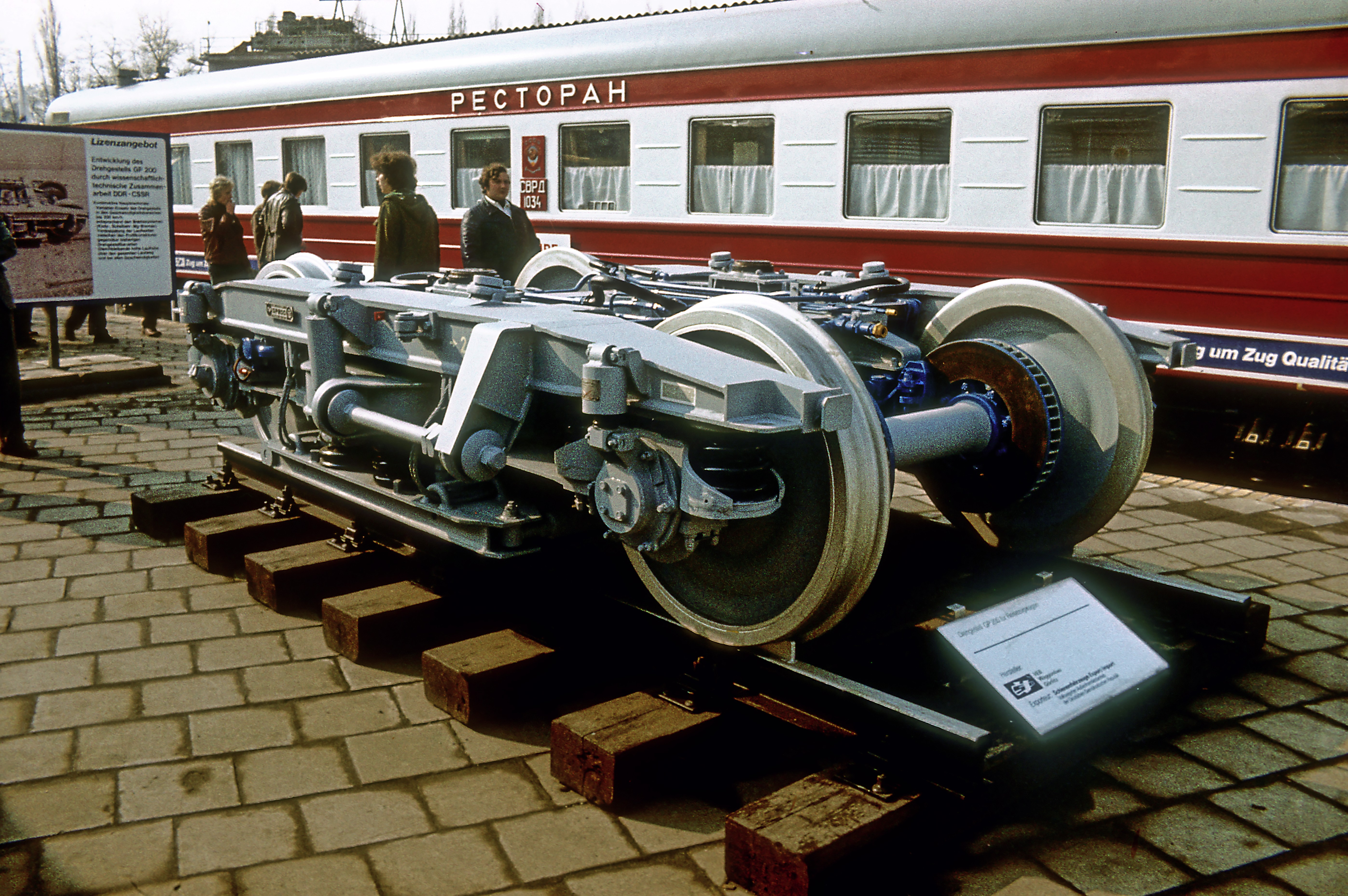 Seitenansicht, die Radsätze werden durch GfK-Blattlenker spielfrei geführt. Die teilbaren Achslagergehäuse ermöglichen einen Radsatzwechsel, ohne die Parallelität der Achsen neueinstellen zu müssen.